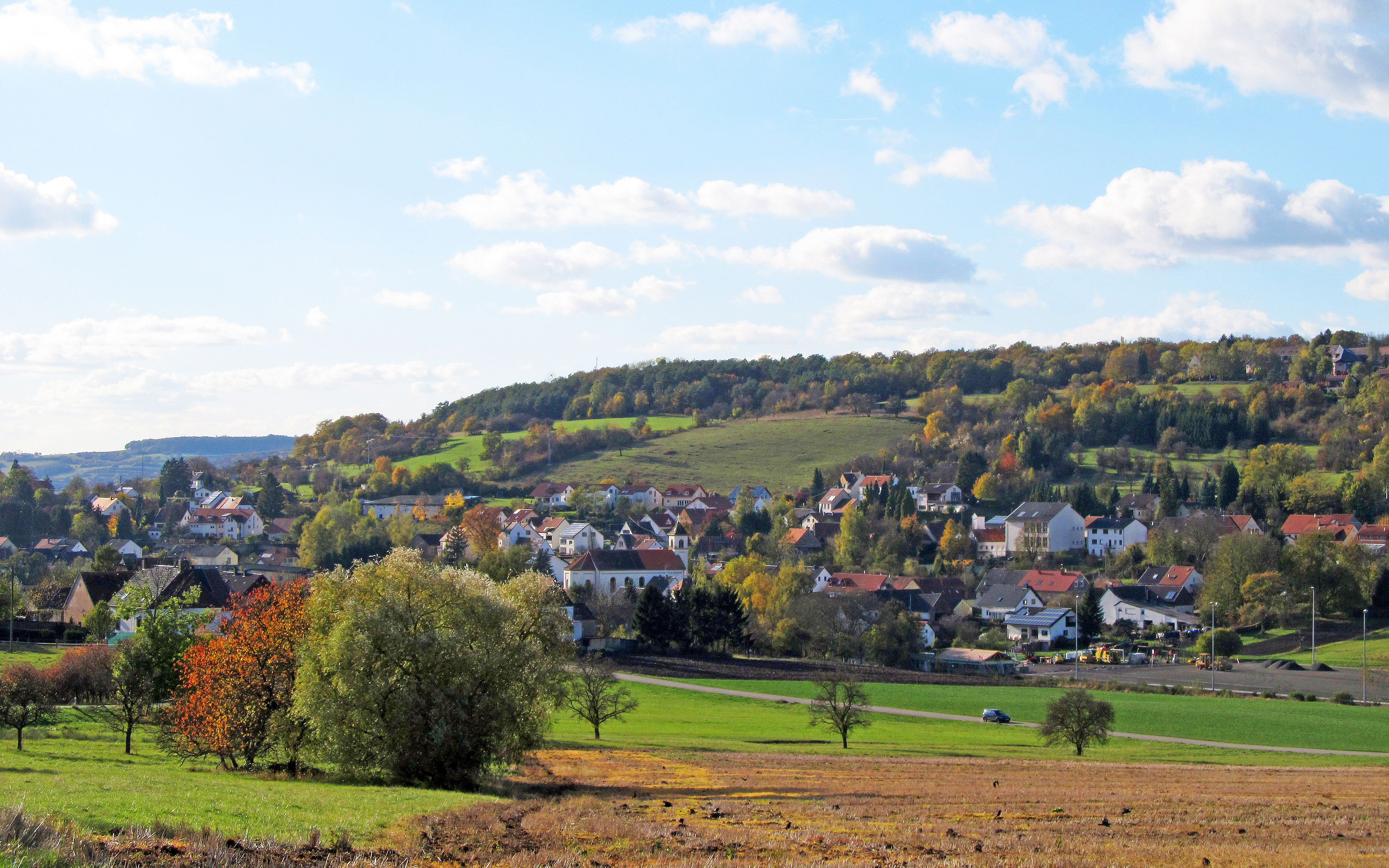 Blick auf Walsheim, einem Ortsteil von Gersheim, Saarpfalz-Kreis, Saarland